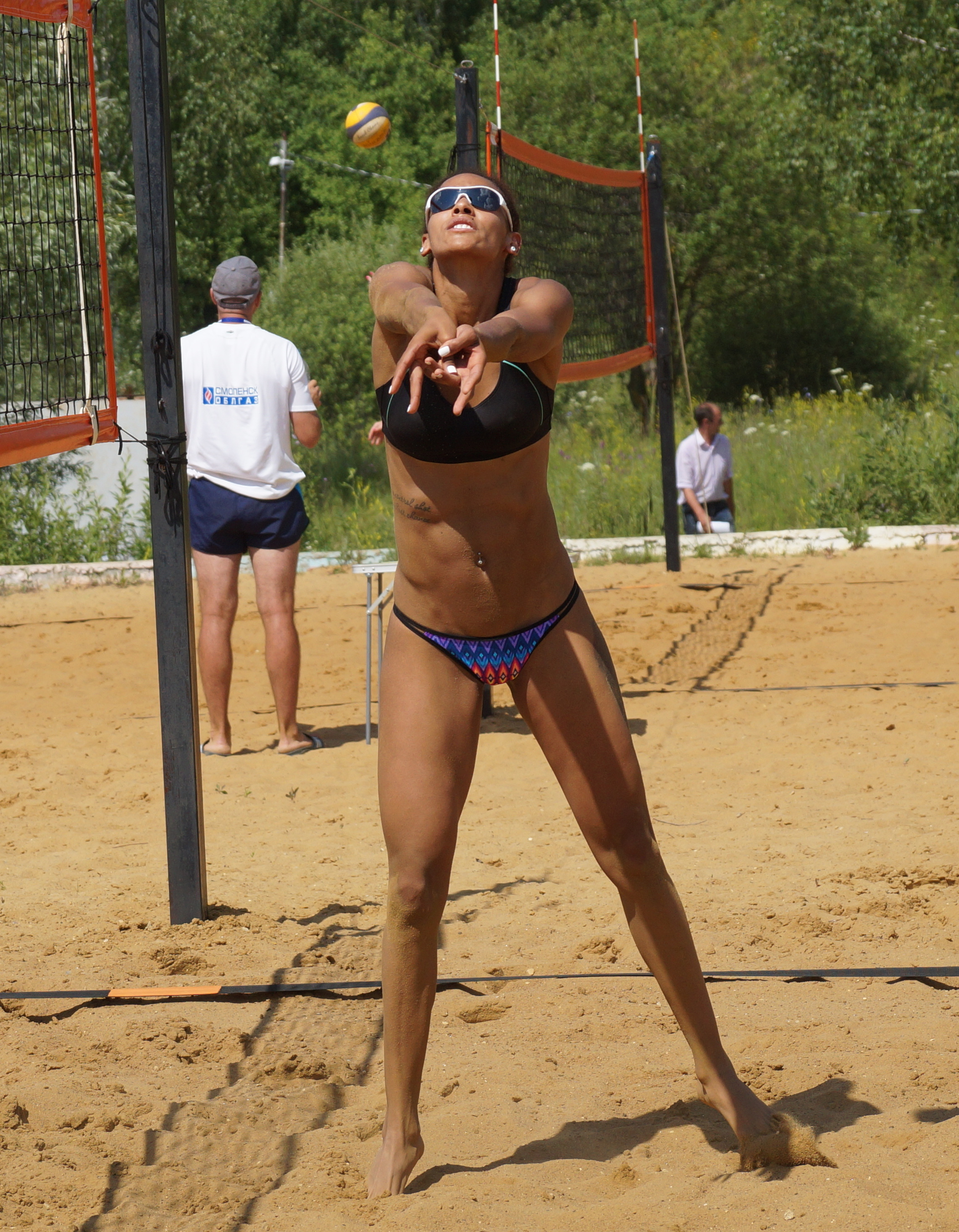 2 июля 2016 Тула Этап Первенства ЦФО